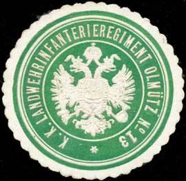 Sealing stamp Title: K.K. Landwehrinfanterieregiment Olmütz No. 13 Description: grün, weiß, geprägt Place: Olmütz size: 4 cm